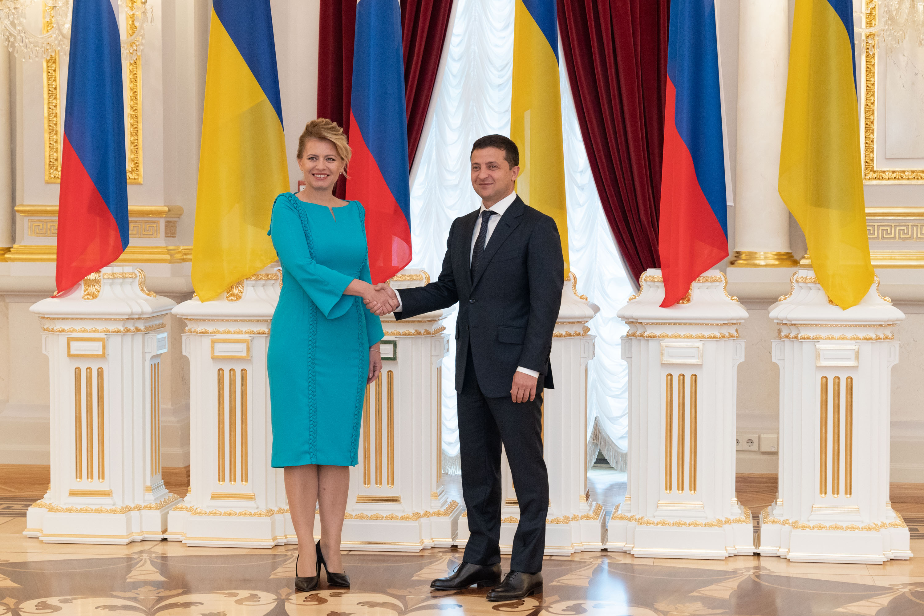 Президент України Володимир Зеленський розпочав зустріч з Президентом Словацької Республіки Зузаною Чапутовою.